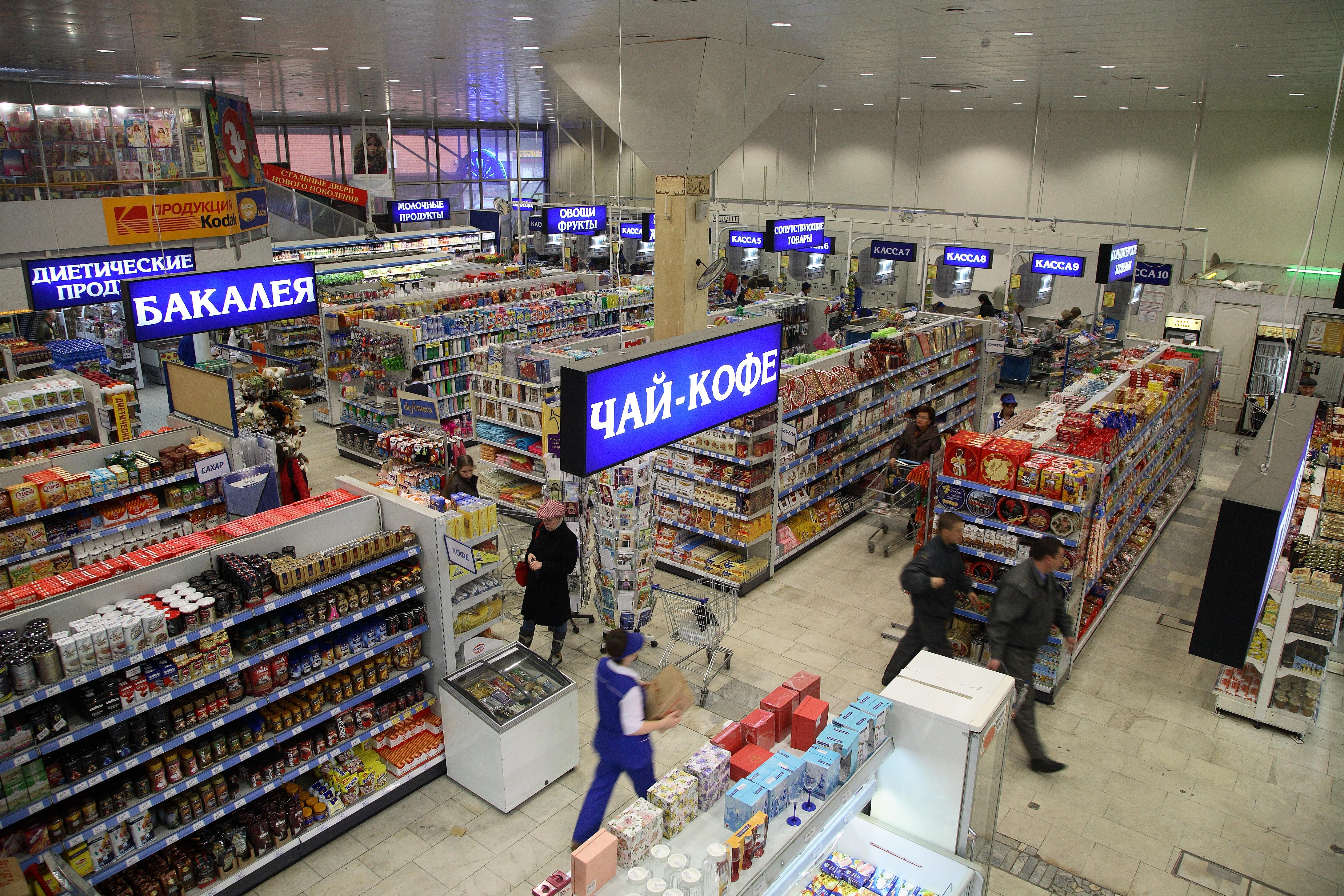 Торговый зал современного универсама. г.Москва